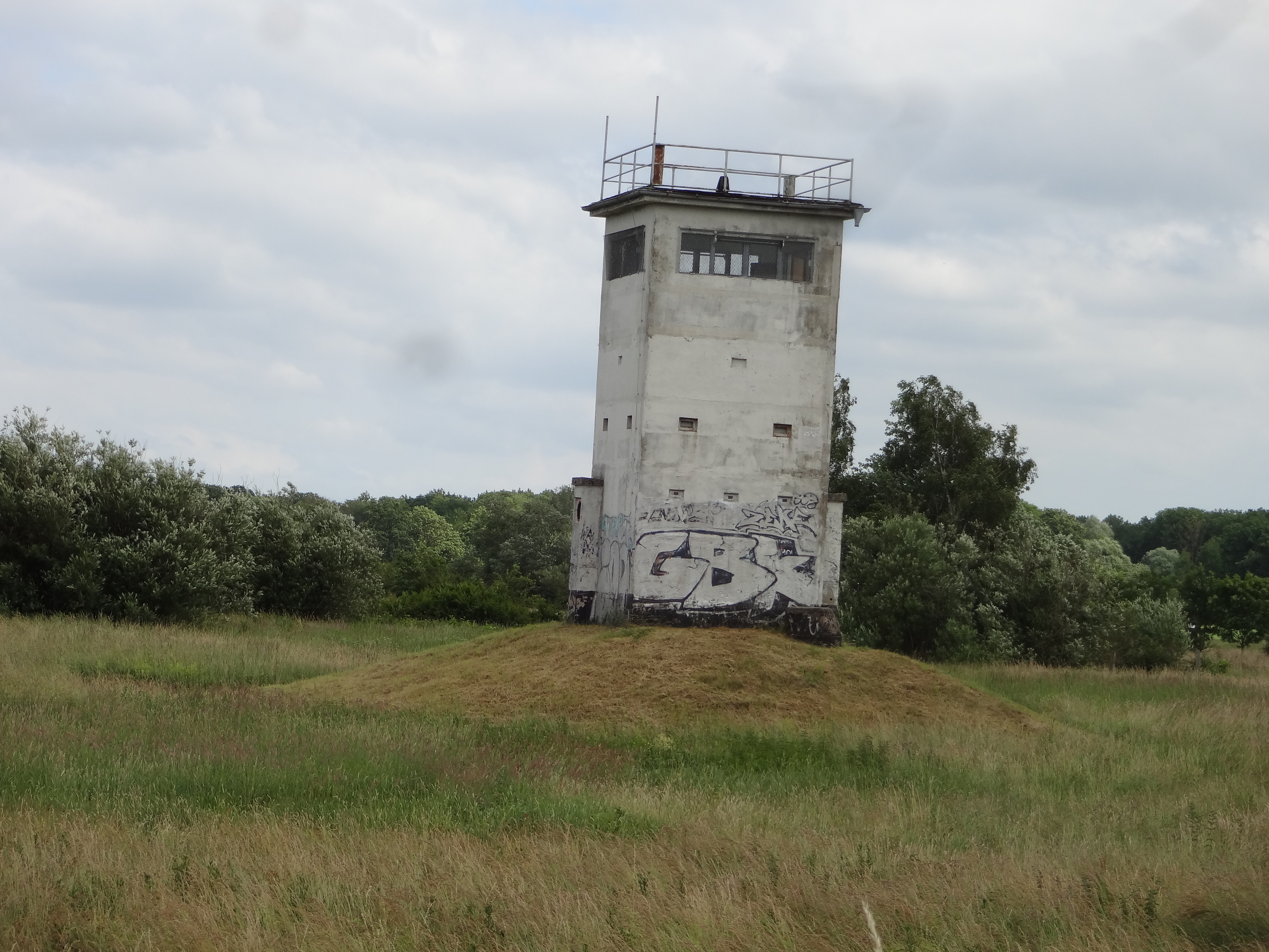 Denkmalgeschützter Wachturm inördlich von Hoyersburg (Stadt Salzwedel), zwischen Hoyersburg und Lübbow; Baudenkmal-Nr. 094 25261